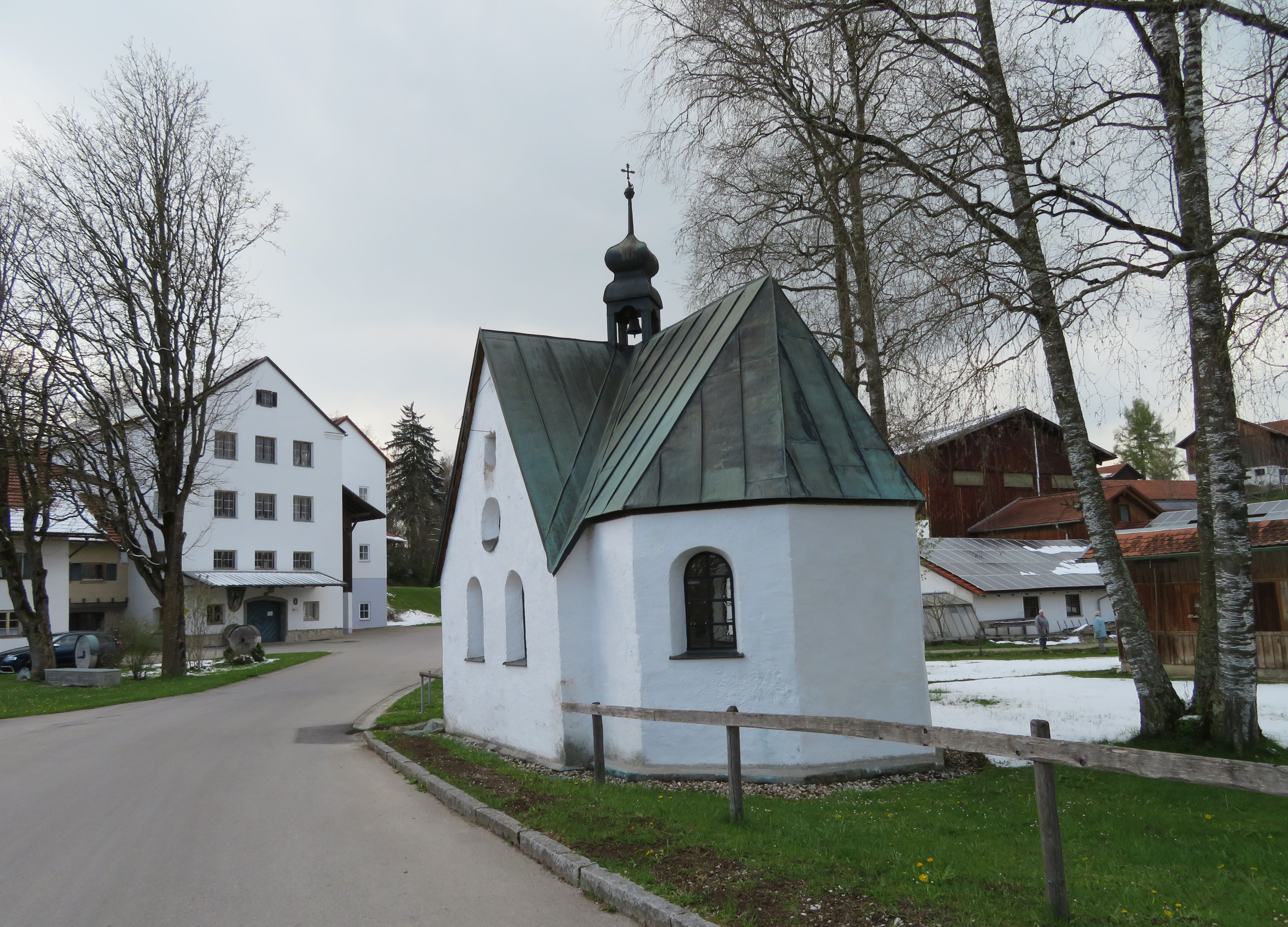 Marienkapelle